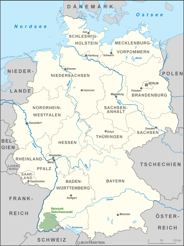 Karte des Naturparks Südschwarzwald in Deutschland